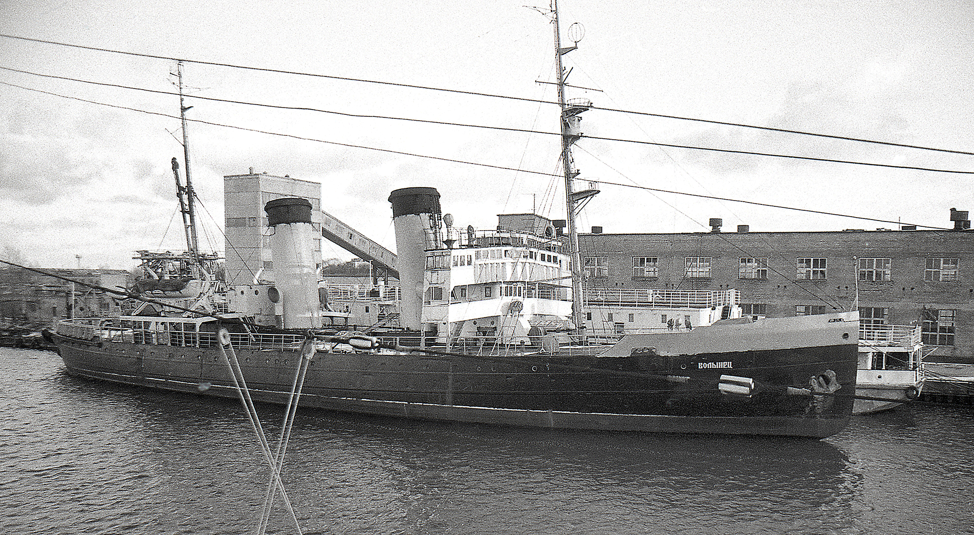 21. novembril 1988 sai laev tagasi oma nime – Suur Tõll